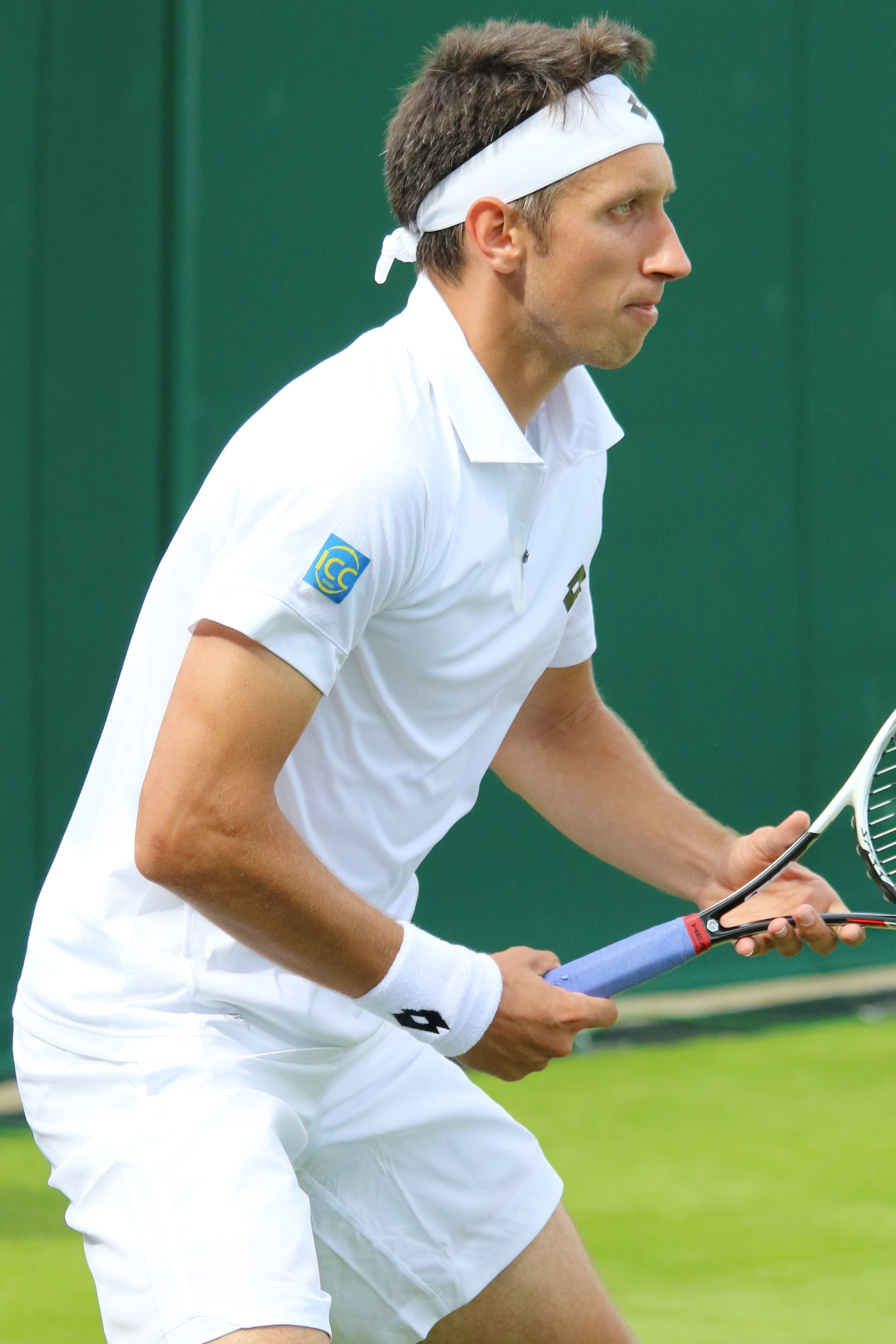 Stakhovsky WM17 (1)